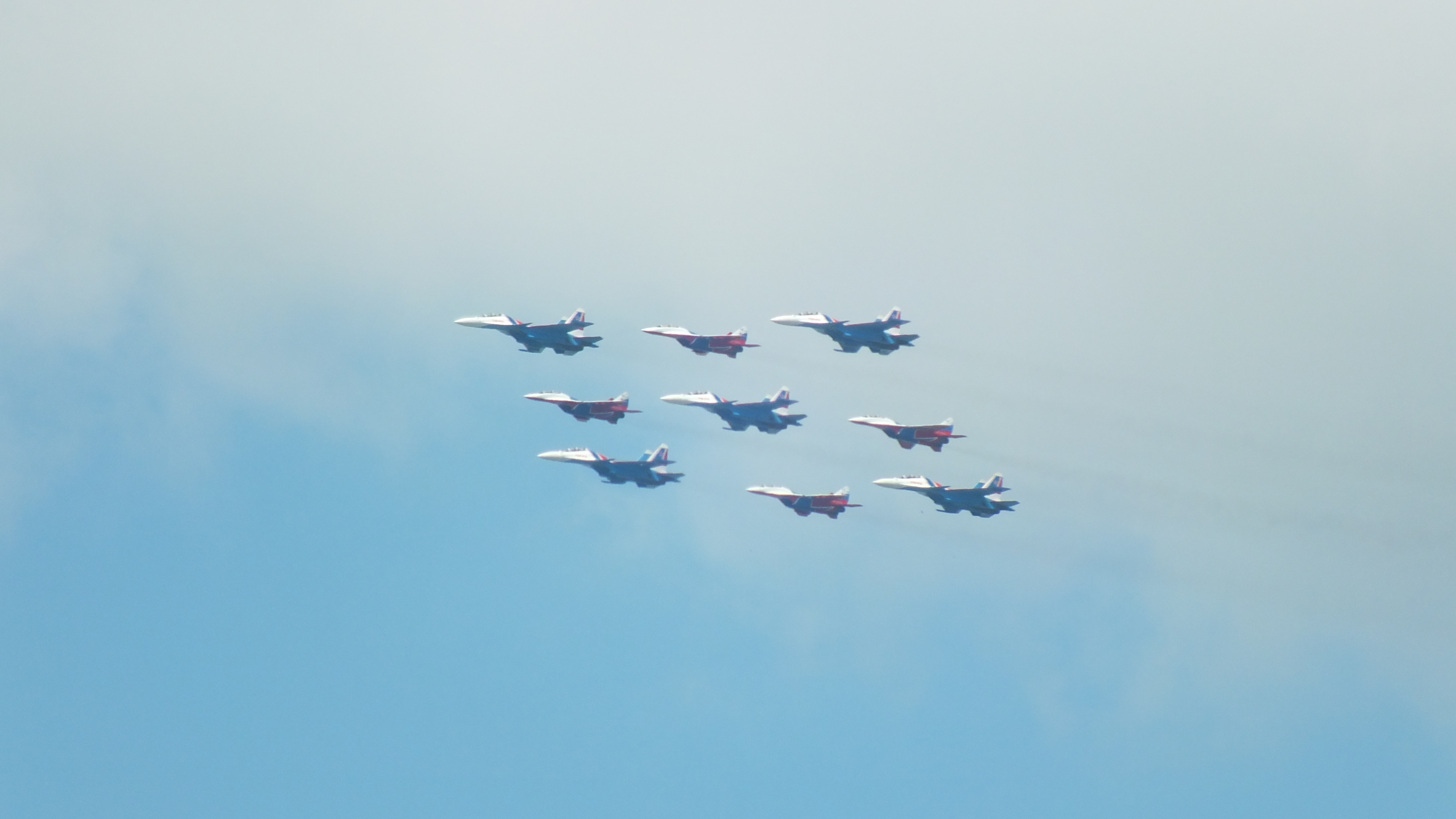 Авиация на Параде Победы 24 июня 2020 года в Москве в честь празднования 75-летия Победы в Великой Отечественной войне. Вид из московского района Братеево